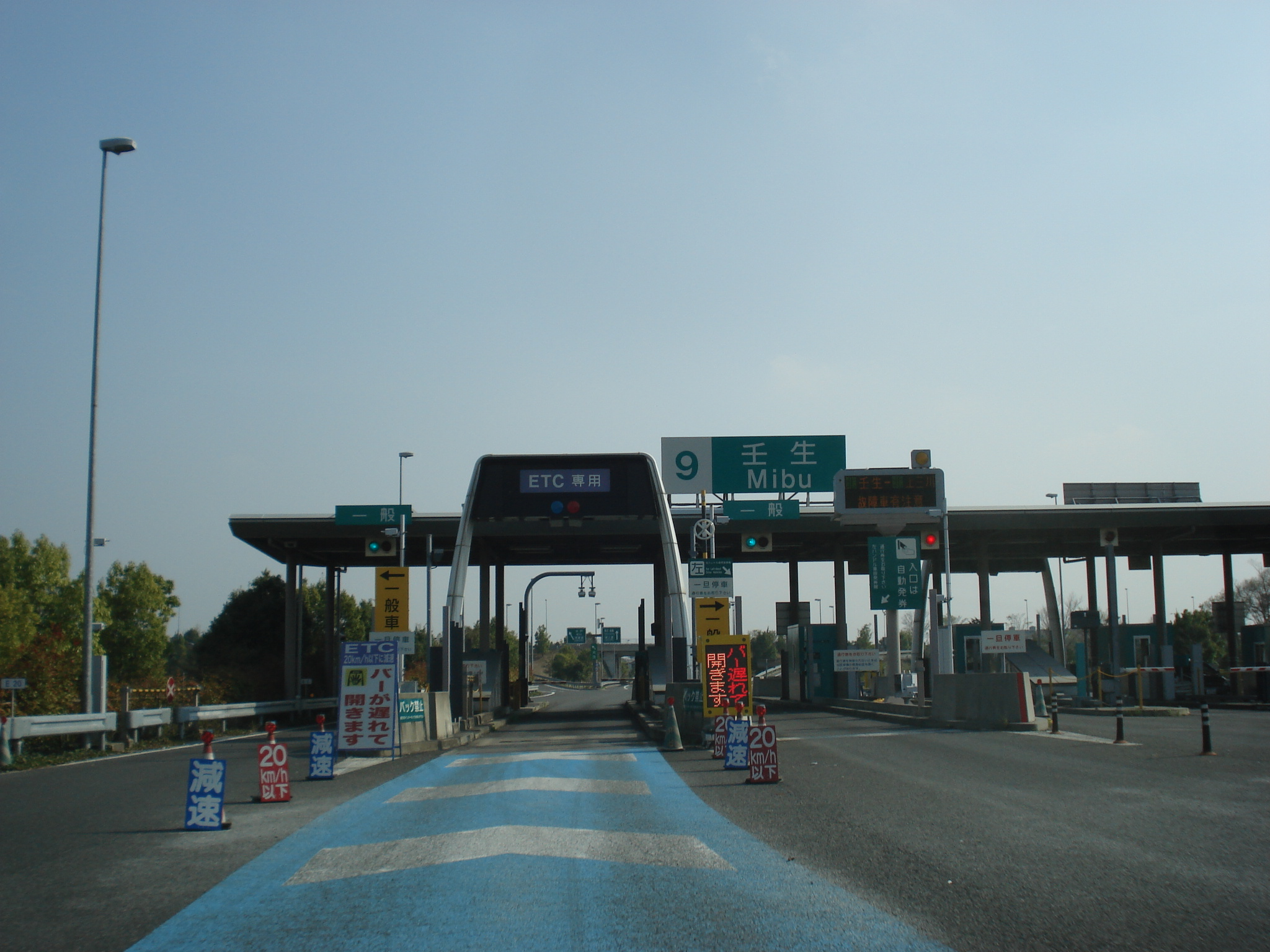 北関東自動車道 壬生インターチェンジ